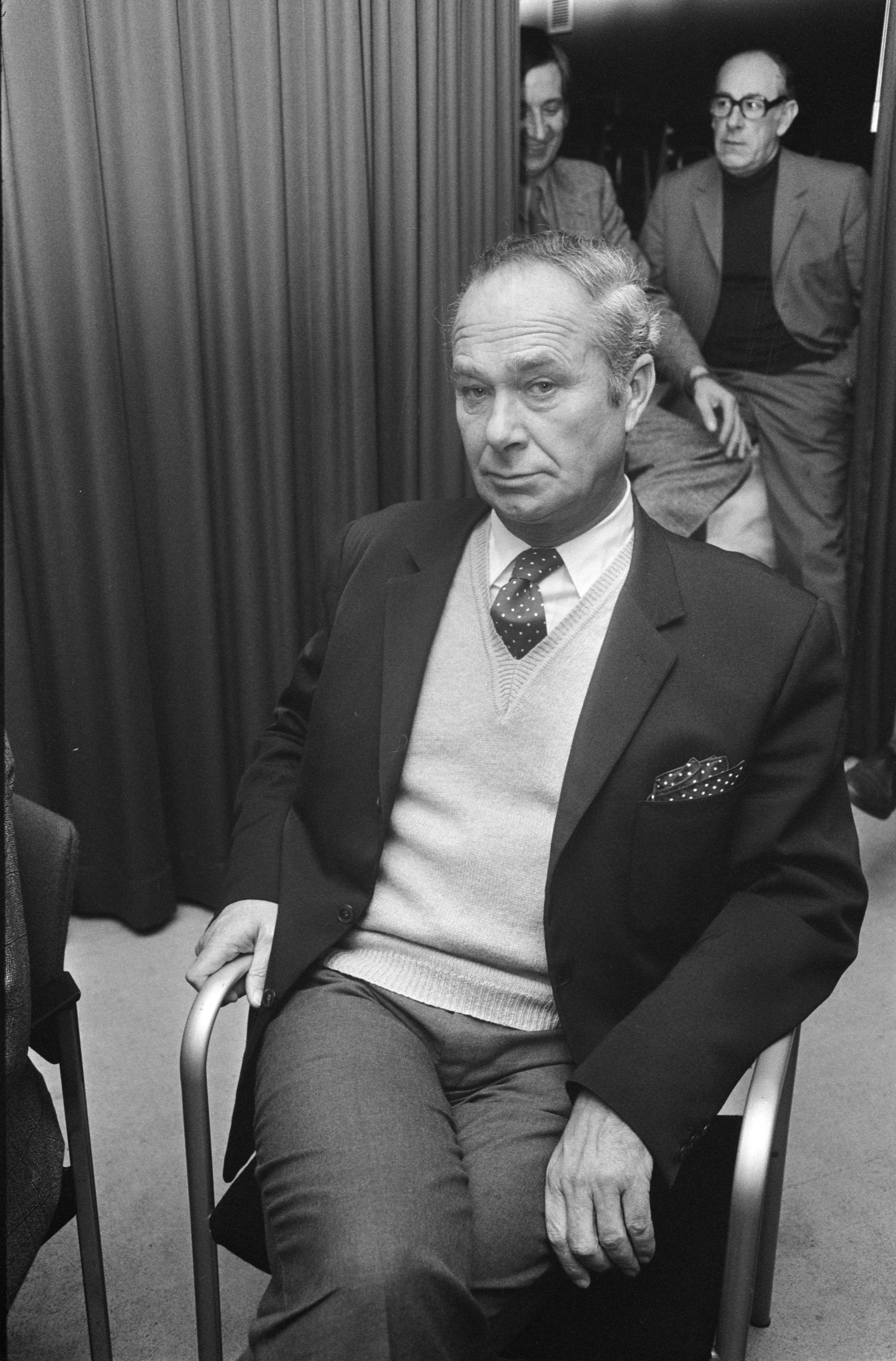 Collectie / Archief : Fotocollectie Anefo Reportage / Serie : Rinus Michels, supervisor van het Nederlands elftal bij het WK voetbal in 1974 geeft een persconferentie in het KNVB-centrum te Zeist Beschrijving : Trainer Fadrhonc Datum : 6 februari 1974 Locatie : Utrecht, Zeist Trefwoorden : persconferenties, portretten, sport, trainers, voetbal Persoonsnaam : Fadrhonc, František, Michels, Rinus Fotograaf : Fotograaf Onbekend / Anefo Auteursrechthebbende : Nationaal Archief Materiaalsoort : Negatief (zwart/wit) Nummer archiefinventaris : bekijk toegang 2.24.01.05 Bestanddeelnummer : 926-9880